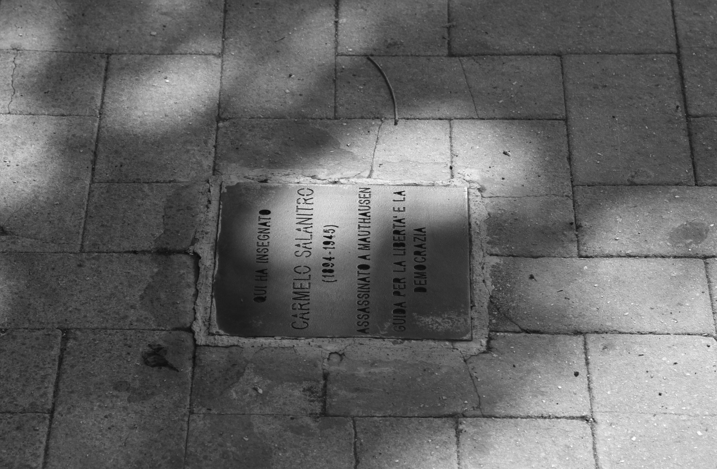 Gedenkstein in Catania